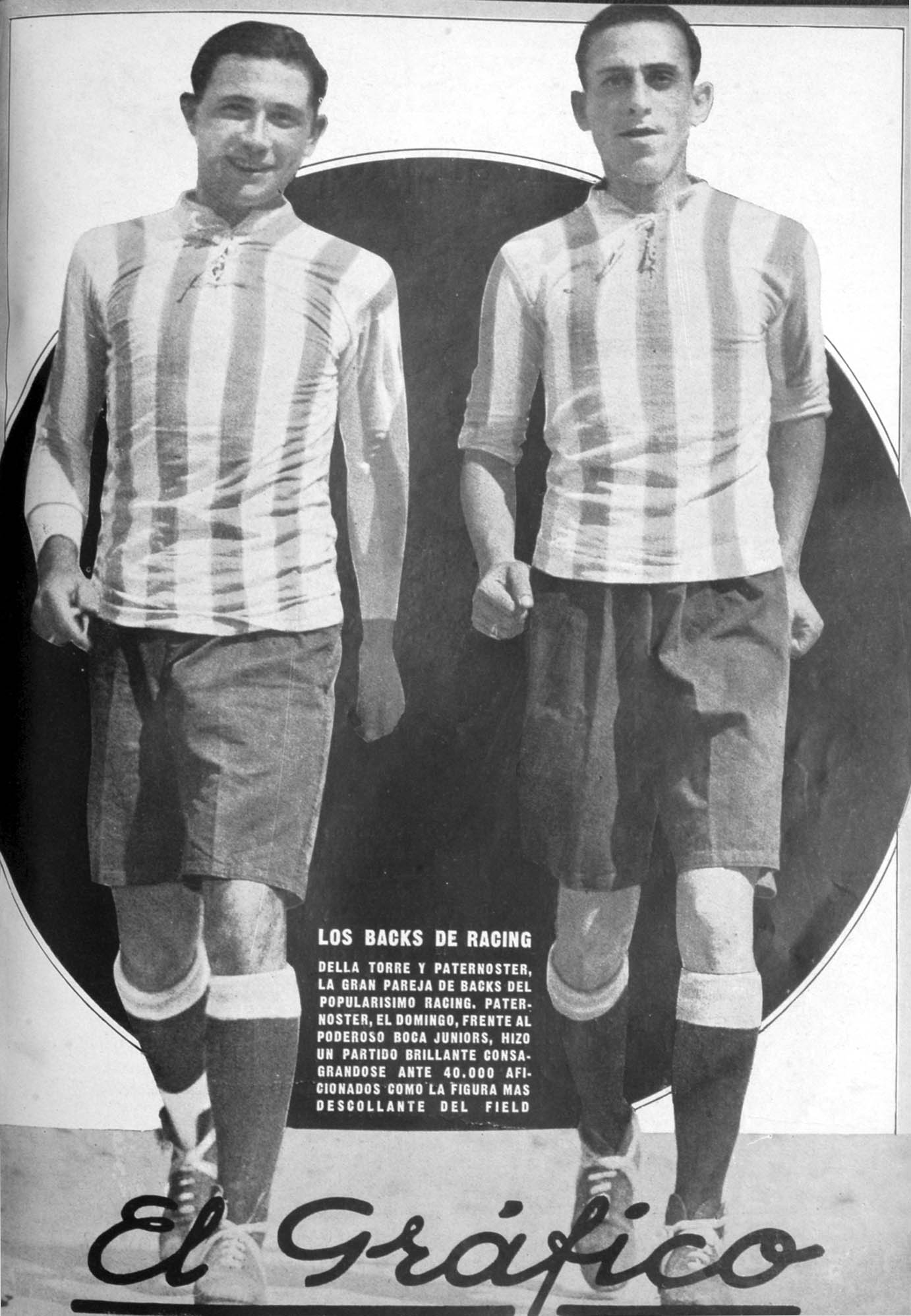 El Grafico del 23 de Marzo de 1929. Edicion 507